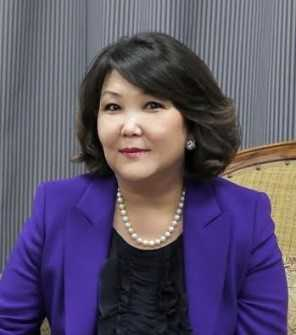 июнь 2016 года